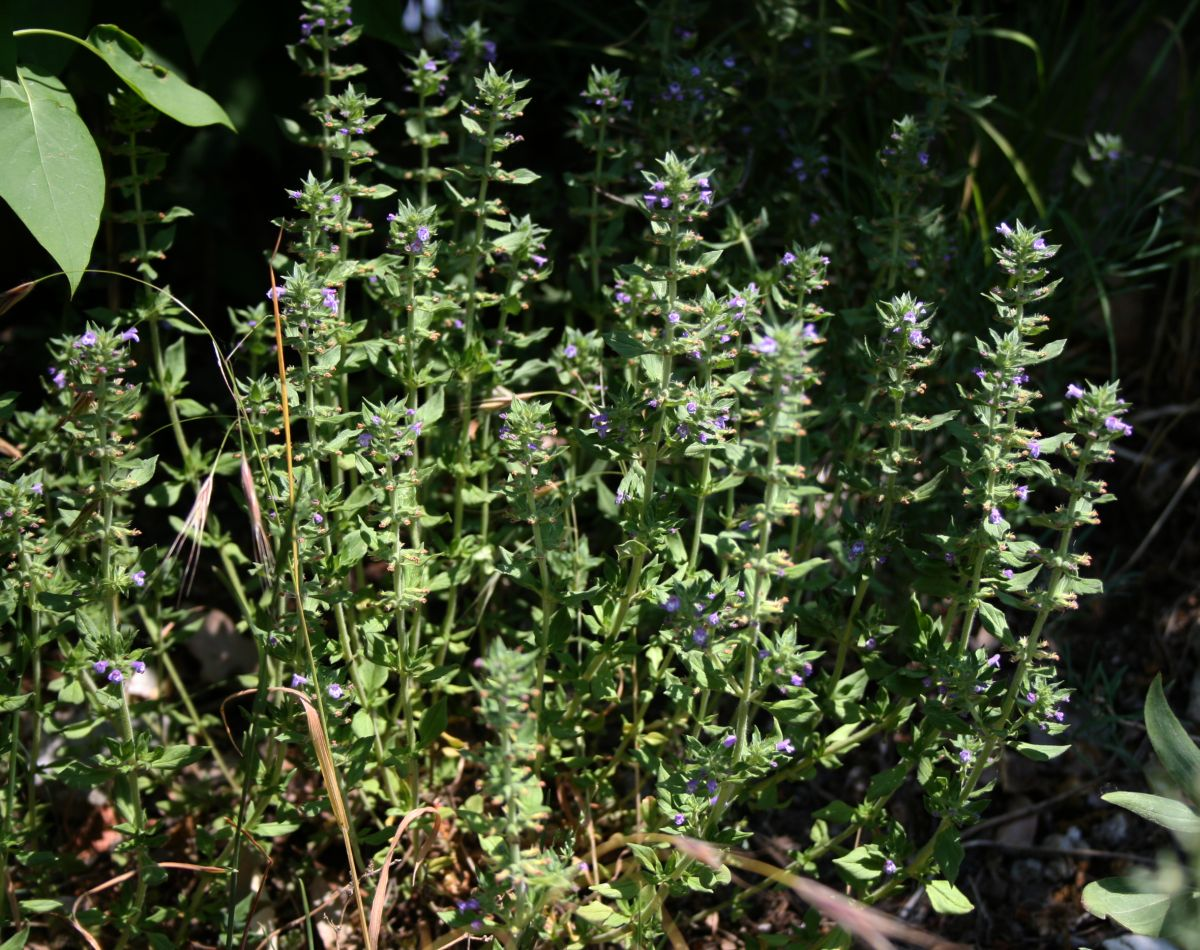 Feld-Steinquendel (Clinopodium acinos, Syn: Acinos arvensis), Lippenblütler (Lamiaceae) - Ungarn/Magyarország/Hungary: Pest megye, Burg Visegrád